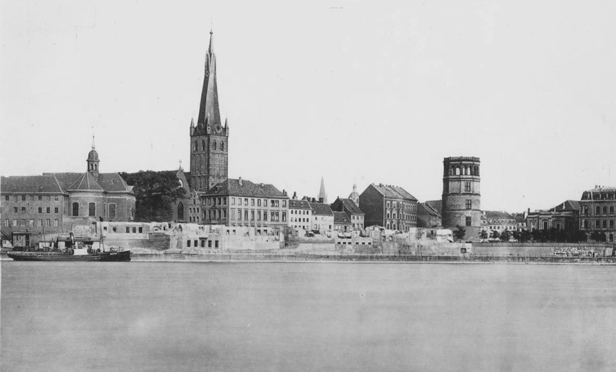 Abbruch des Häuserblocks am rechten Rheinufer vor der Lambertuskirche, 1898 (Tafel 27) - Abbruch der Krämerstraße am Schlossufer; links ehemaliges Kloster der Karmelitessen übernommen von den Töchtern vom heiligen Kreuz mit altem Theresienhospital, Josephskapelle, Lambertuskirche, Burgplatz mit Schlossturm und Kunstgewerbeschule